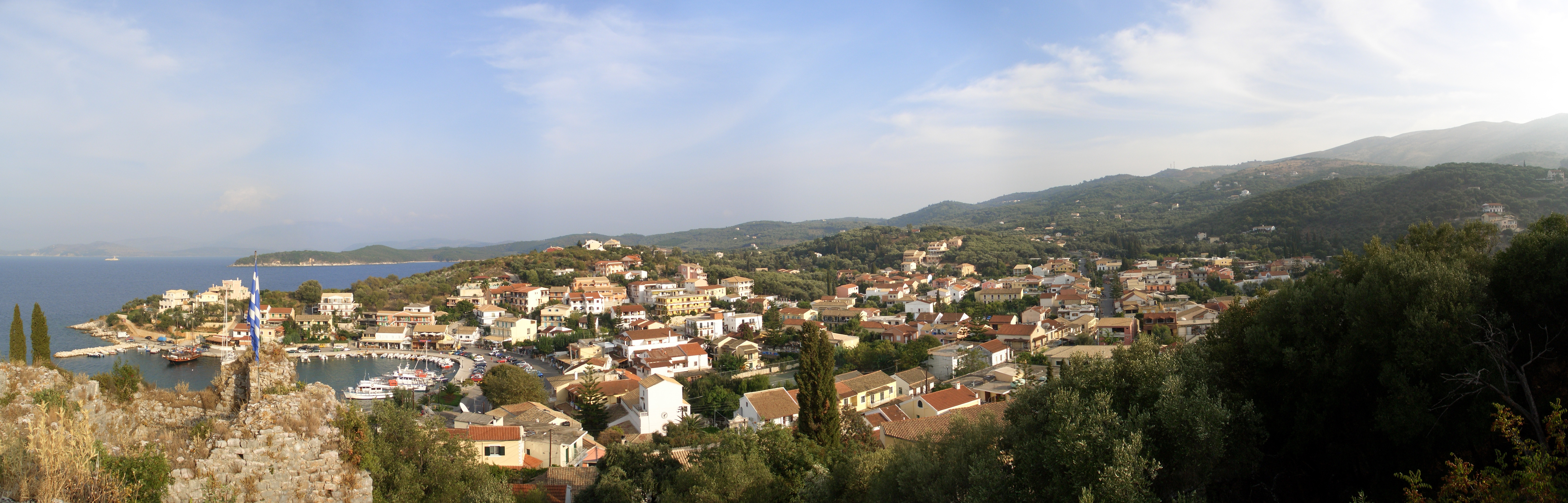 Kassiopi auf Korfu in Griechenland. Sicht vom Kastell in Richtung Süden auf den Hafen von Kassiopi. Fotograf: Habe ich selbst fotografiert (Benutzer:Bejo) Copyright Status: GNU Freie Dokumentationslizenz